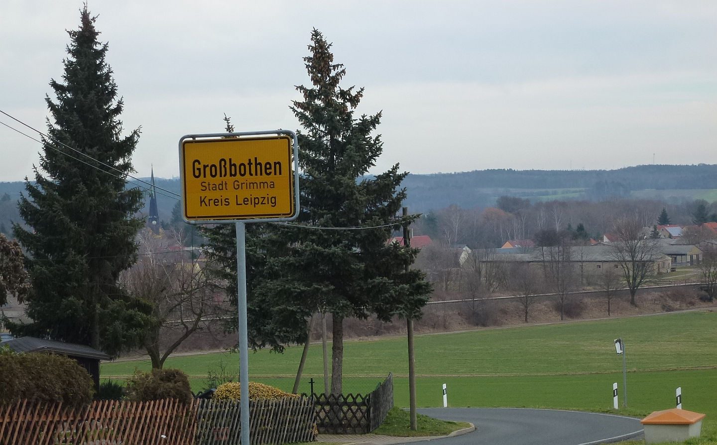 Ortseingang von Großbothen aus Richtung Kleinbardau